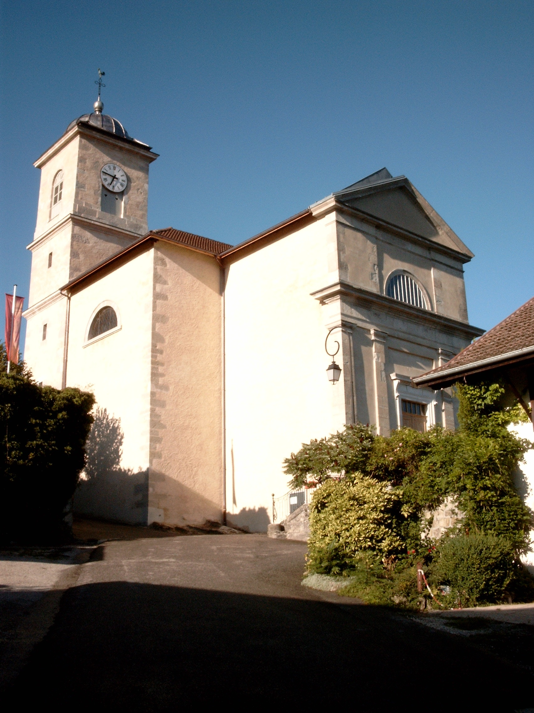 vue de l'église de Clermont-en-Genevois